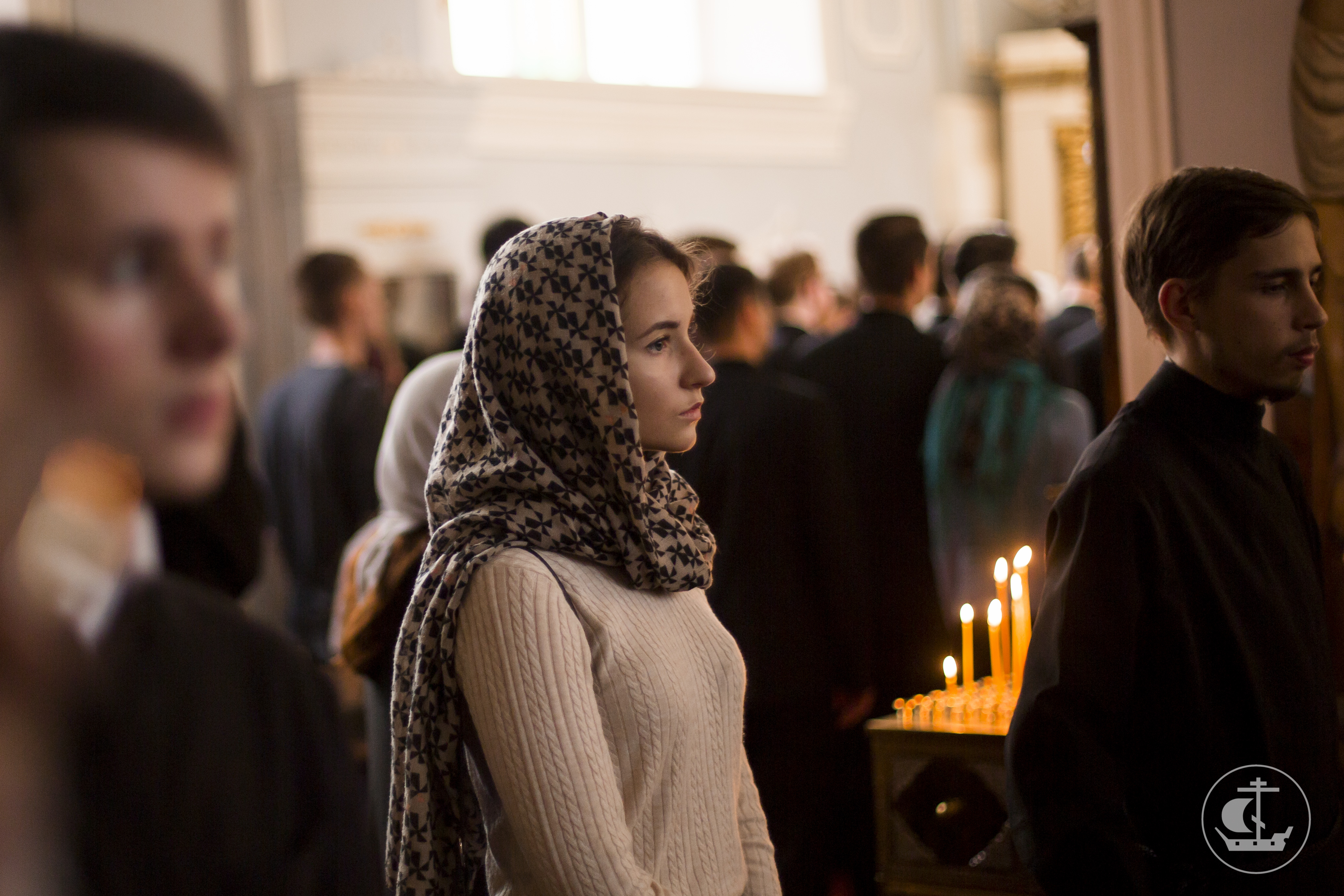 24 сентября 2016, Неделя 14-я по Пятидесятнице, перед Воздвижением / 24 September 2016, 14th Sunday after Pentecost